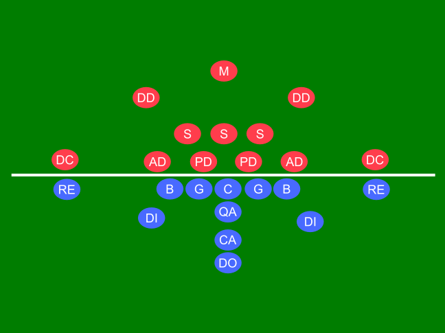 Amélioration de l'image Image:Football canadien formations.jpg L'image d'origine postée par Utilisateur:Pi-R a été recréée sous Inkscape puis exportée au format PNG.